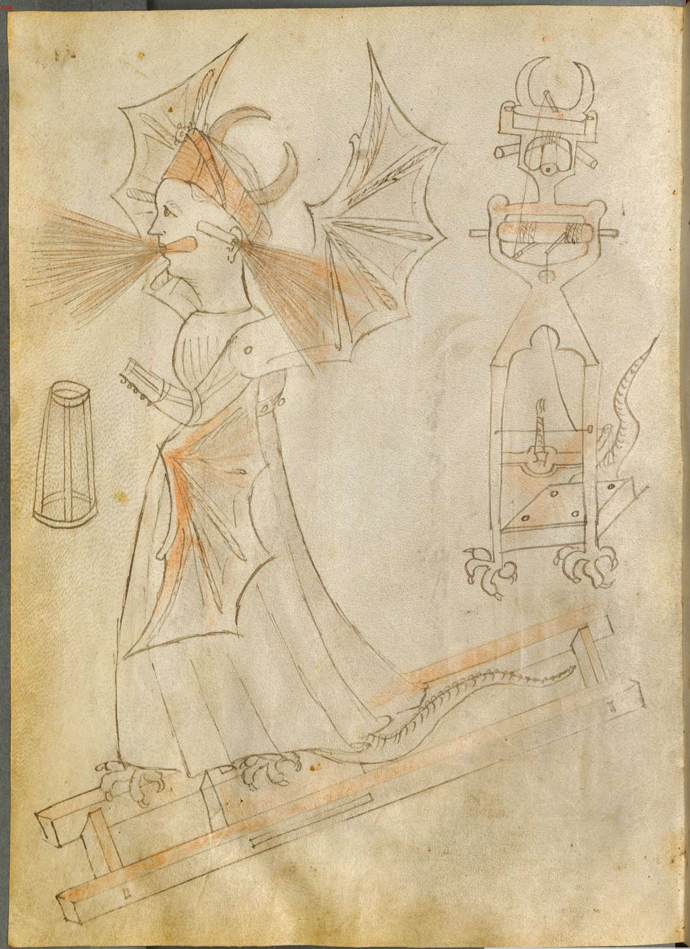 Feuerhexe aus Johannes : Bellicorum instrumentorum liber cum figuris - BSB Cod.icon. 242, Bl. 63v